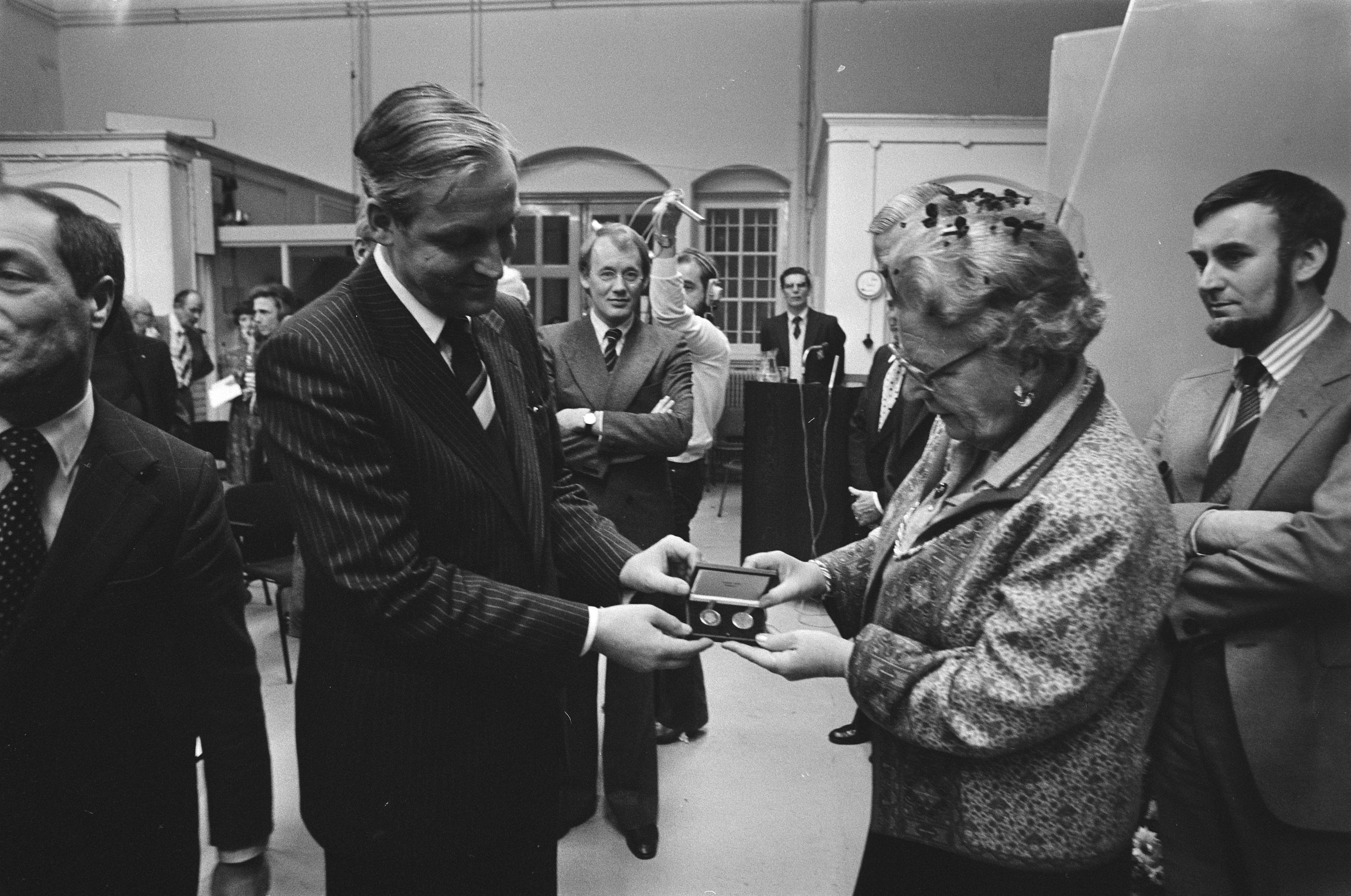 Collectie / Archief : Fotocollectie Anefo Reportage / Serie : Hare Majesteit slaat eerste Unierijksdaalder in Utrecht Beschrijving : koningin Juliana ontvangt eerste munten van staatssecretaris Nooteboom Datum : 17 november 1978 Locatie : Utrecht (provincie), Utrecht (stad) Trefwoorden : koninginnen, munten, staatssecretarissen Persoonsnaam : Juliana (koningin Nederland), Juliana (koningin Nederland), Nooteboom, A. Fotograaf : Croes, Rob C. / Anefo Auteursrechthebbende : Nationaal Archief Materiaalsoort : Negatief (zwart/wit) Nummer archiefinventaris : bekijk toegang 2.24.01.05 Bestanddeelnummer : 930-0016